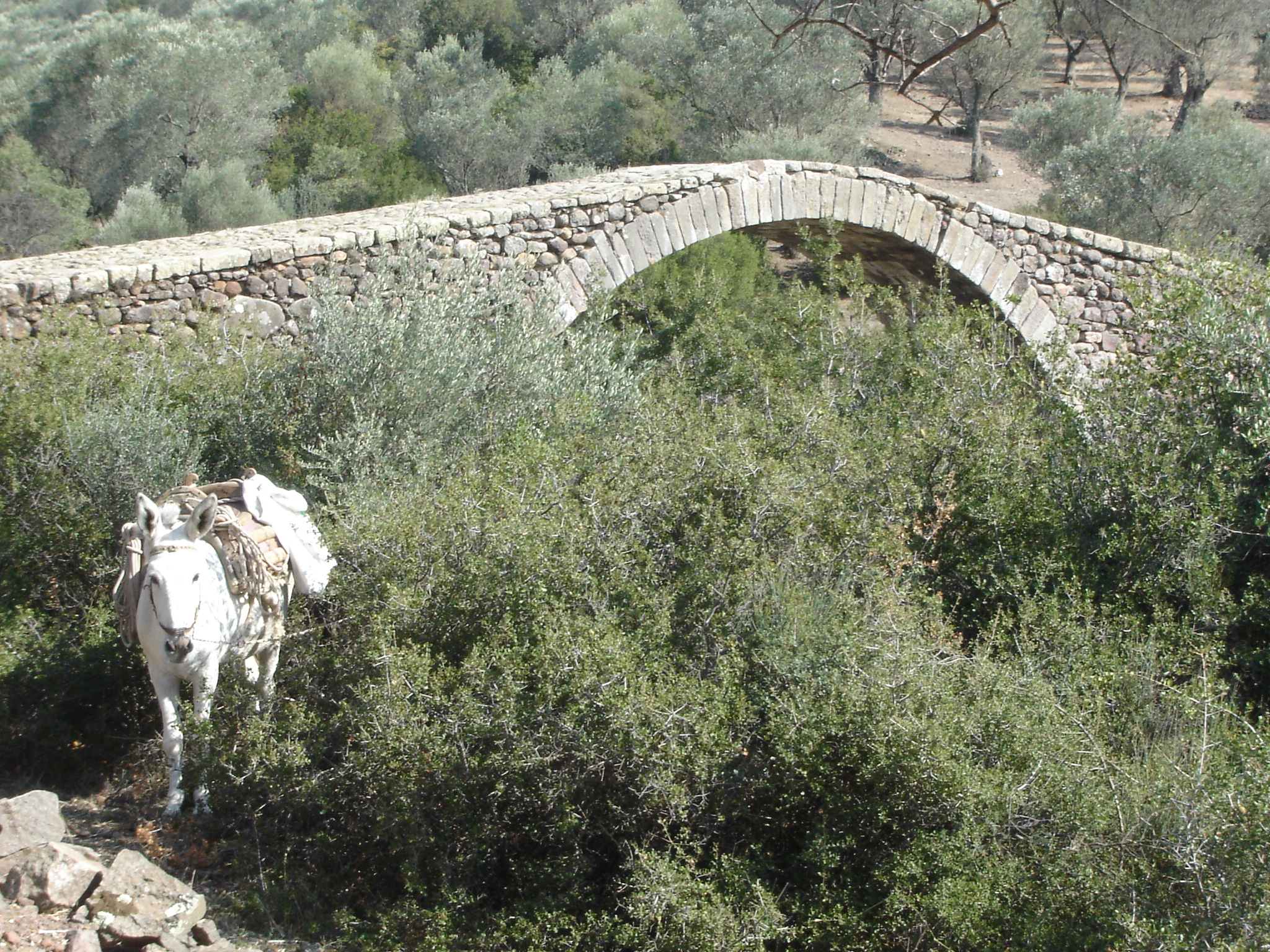 Krtemasti bridge in Agia Paraskevi, Lesbos, Greece